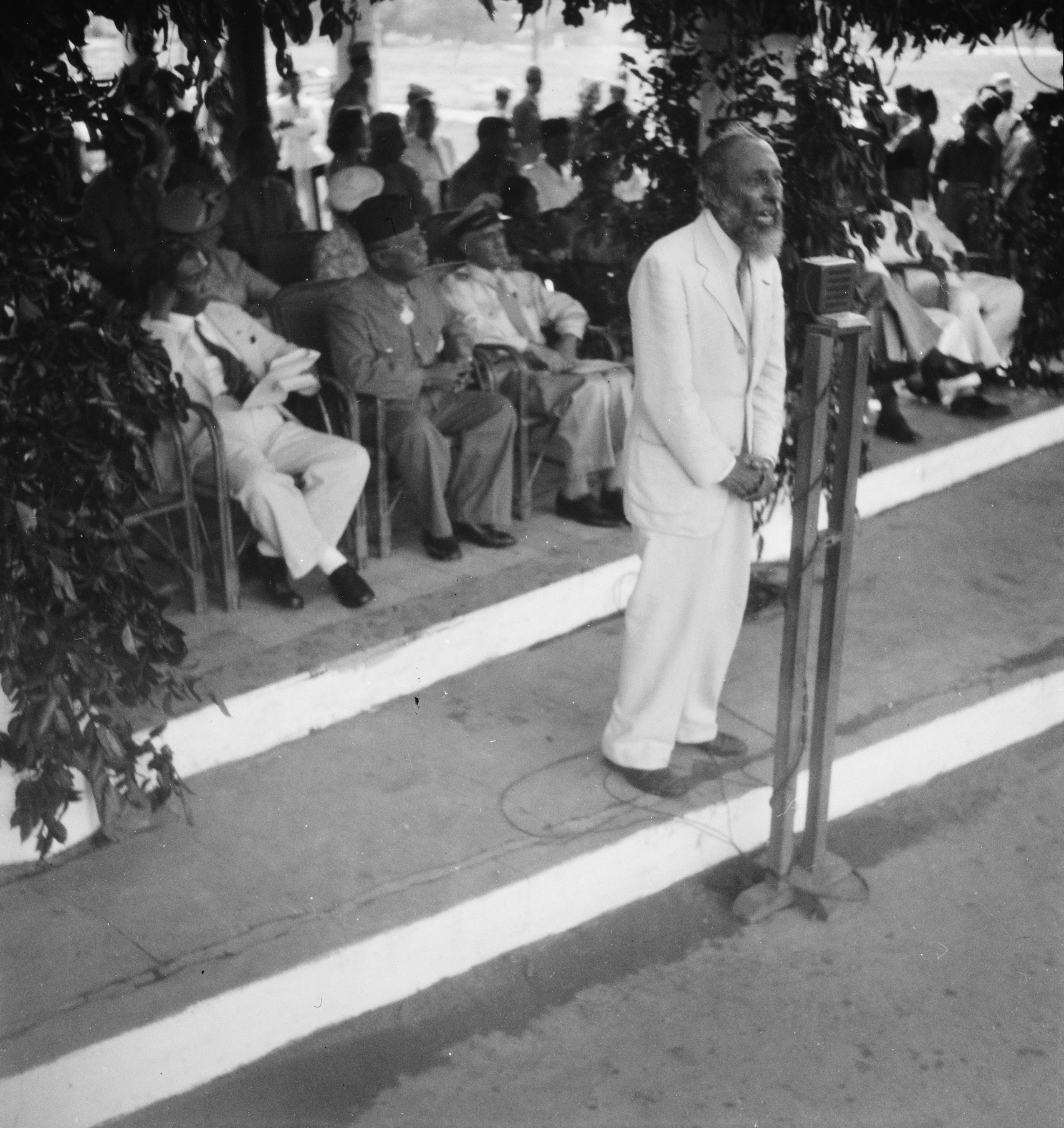 Collectie / Archief : Fotocollectie Dienst voor Legercontacten Indonesië Reportage / Serie : [DLC] Herdenking 1-jarig bestaan Veiligheidsbataljon (Barisan Pengawal) Madoera te Bangkalan Beschrijving : [De Recomba van Oost-Java Ch. O. van der Plas tijdens een toespraak] Annotatie : Achter hem vlnr. de Wali Negara van Oost-Java R:P. Achrnad Koesoemoenegoro, de Wali Negara van Madoera A. Tjakraningrat, generaal W.J.K. Baay, territoriaal troepencommandant Oost-Java Datum : 5 mei 1949 Locatie : Indonesië, Nederlands-Indië Fotograaf : Jong, [...] de / DLC Auteursrechthebbende : Nationaal Archief Materiaalsoort : Negatief (zwart/wit) Nummer archiefinventaris : bekijk toegang 2.24.04.03 Bestanddeelnummer : 15954